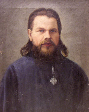 Портрет Алексея Петровича Афонского, 1899(?) год.